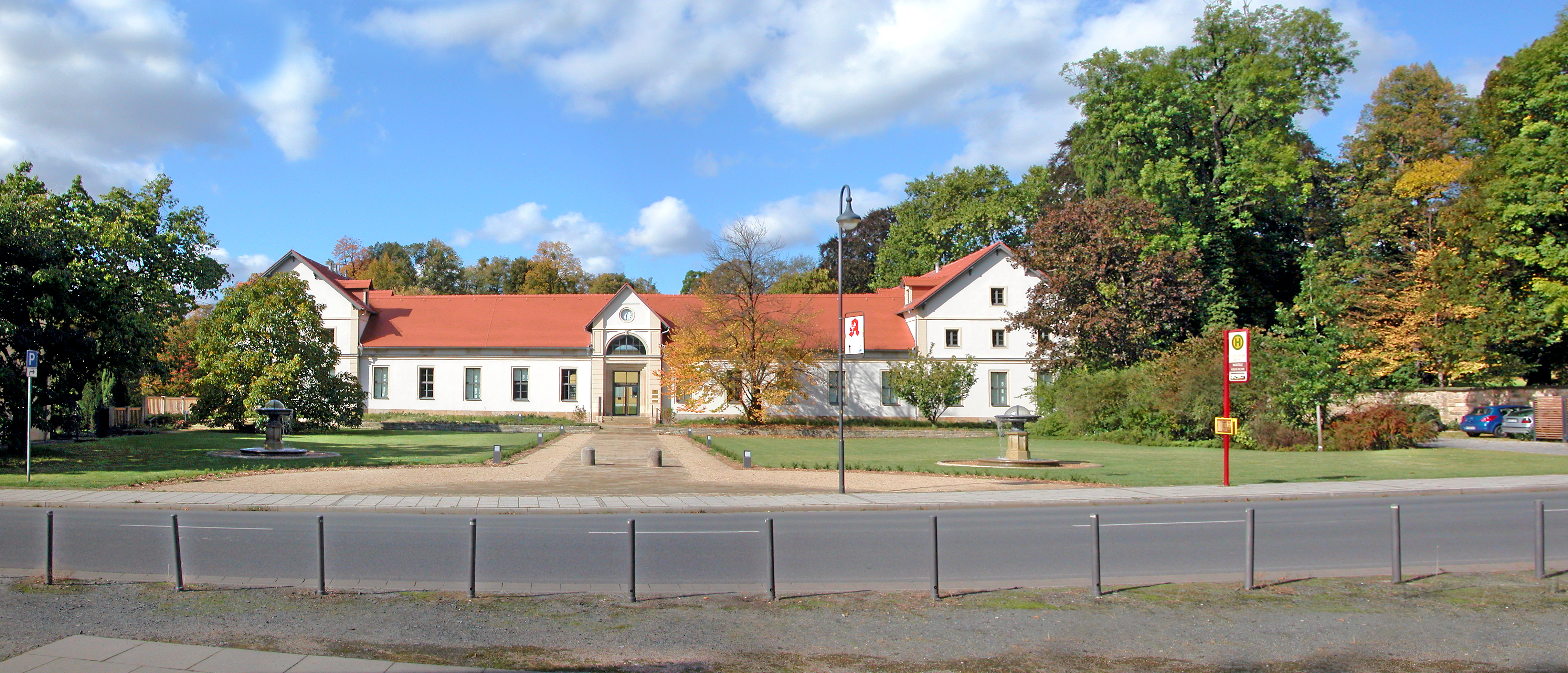 09.10.2009 01326 Dresden-Pillnitz, Pillnitzer Platz 2: Schindlerbau (GMP: 51.010079,13.873852), ehemaliger Marstall (1880 erbaut) als Teil des Kammerguts Pillnitz. Heute Landesamt für Umwelt, Landwirtschaft und Geologie. Davor zwei aus dem Zwinger stammende Brunnen. Pillnitz ist wegen seiner Schloß- und Parkanlage eine Attraktion. Die Gartenresidenz an der Elbe ist aus einem Rittergut hervorgegangen, das im 14. Jahrhundert den Burggrafen von Dohna gehörte. Als Besitzer folgten Heinrich von Karras, Familie Ziegler und Christoph von Loß. 1694 erwarb Kurfürst Johann Georg IV. von Sachsen das Rittergut Pillnitz, das danach an August den Starken überging. Ab 1718 wurde das Rittergut als Kammergut geführt, das zu den ertragreichsten Landwirtschaftsbetrieben in Sachsen gehörte. [DSCN39433-39434.TIF]20091009245MDR.JPG(c)Blobelt